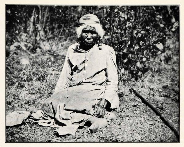 Місіс Молассес (Меляса) – жінка з племені чілула